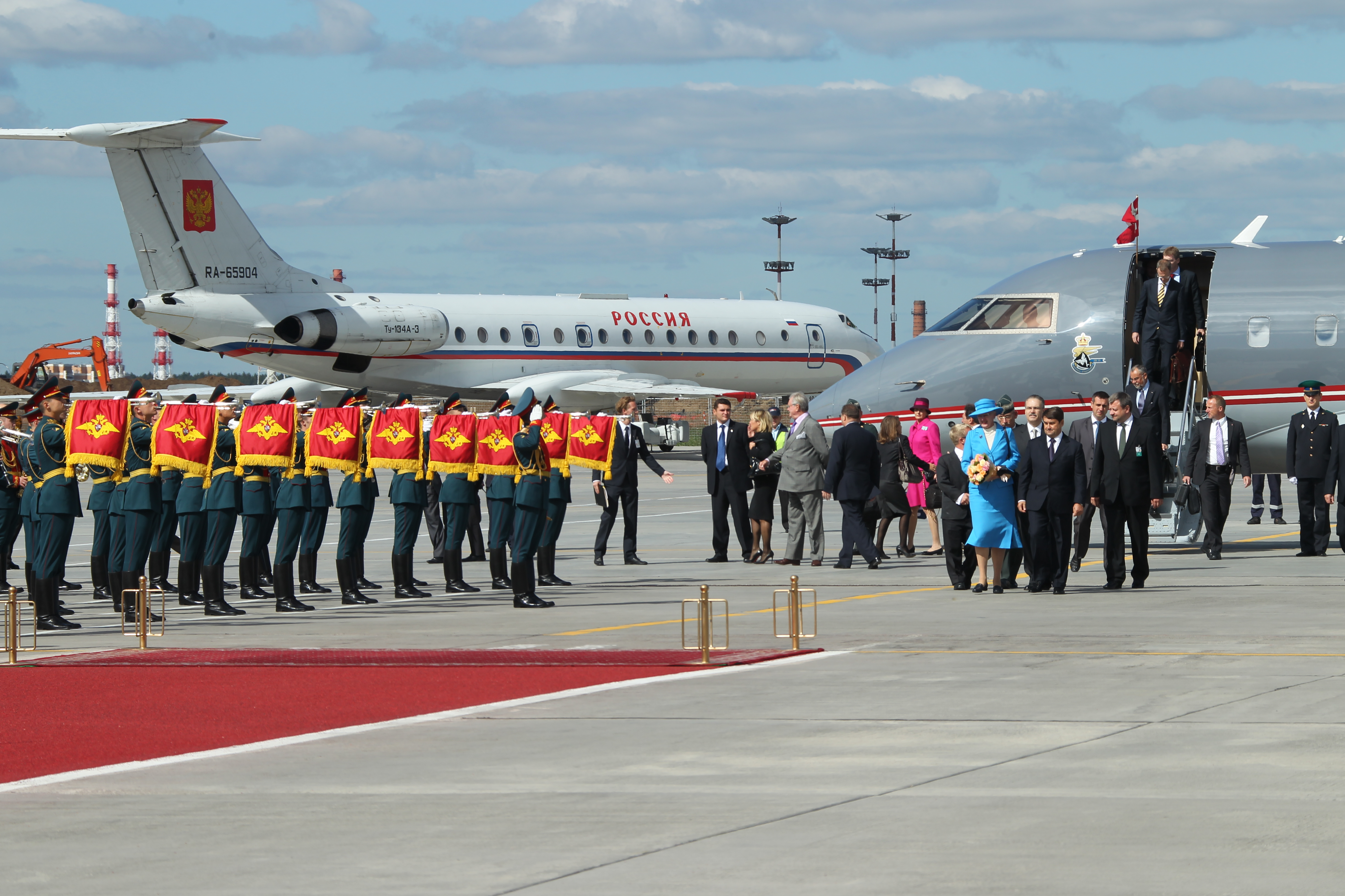 Встреча Королевы Дании сентябрь 2011 г.